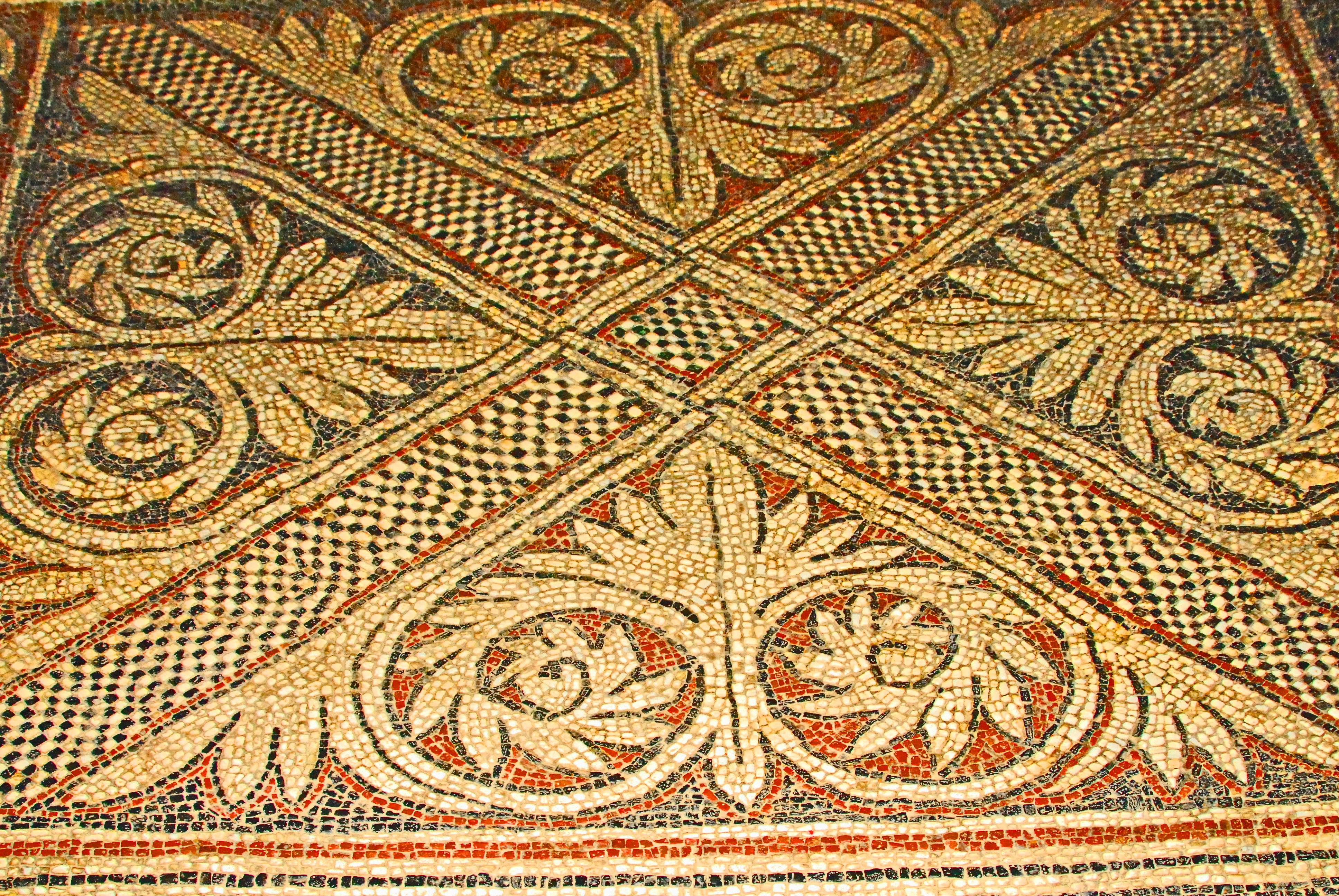 Prieuré de Ganagobie,Schiff, Mosaik Nr. 12